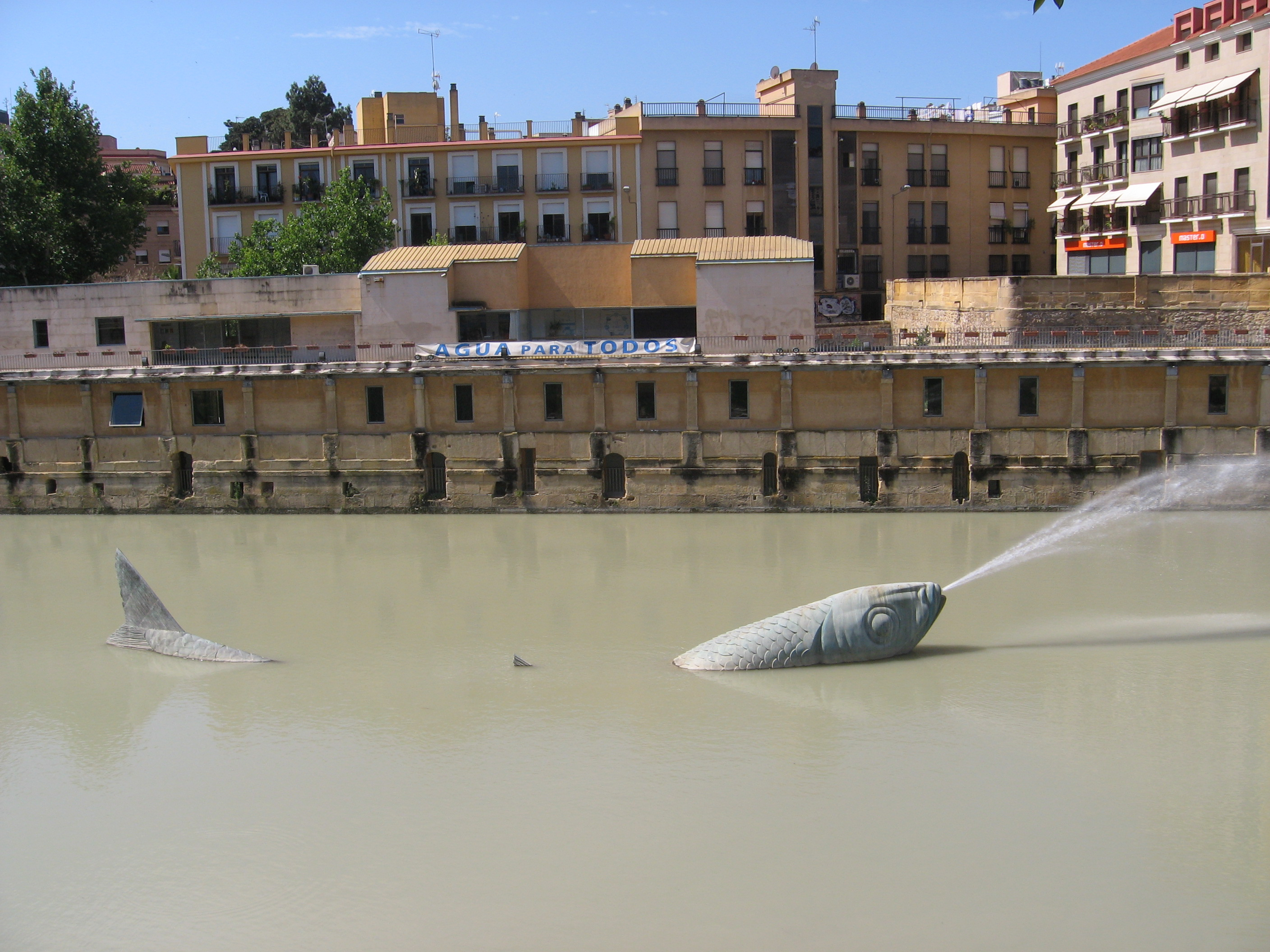 Monumento en el centro del rio Segura a su paso por Murcia a la Sardina, en honor al tradicional Entierro de la Sardina que se celebra en la capital murciana cada año.